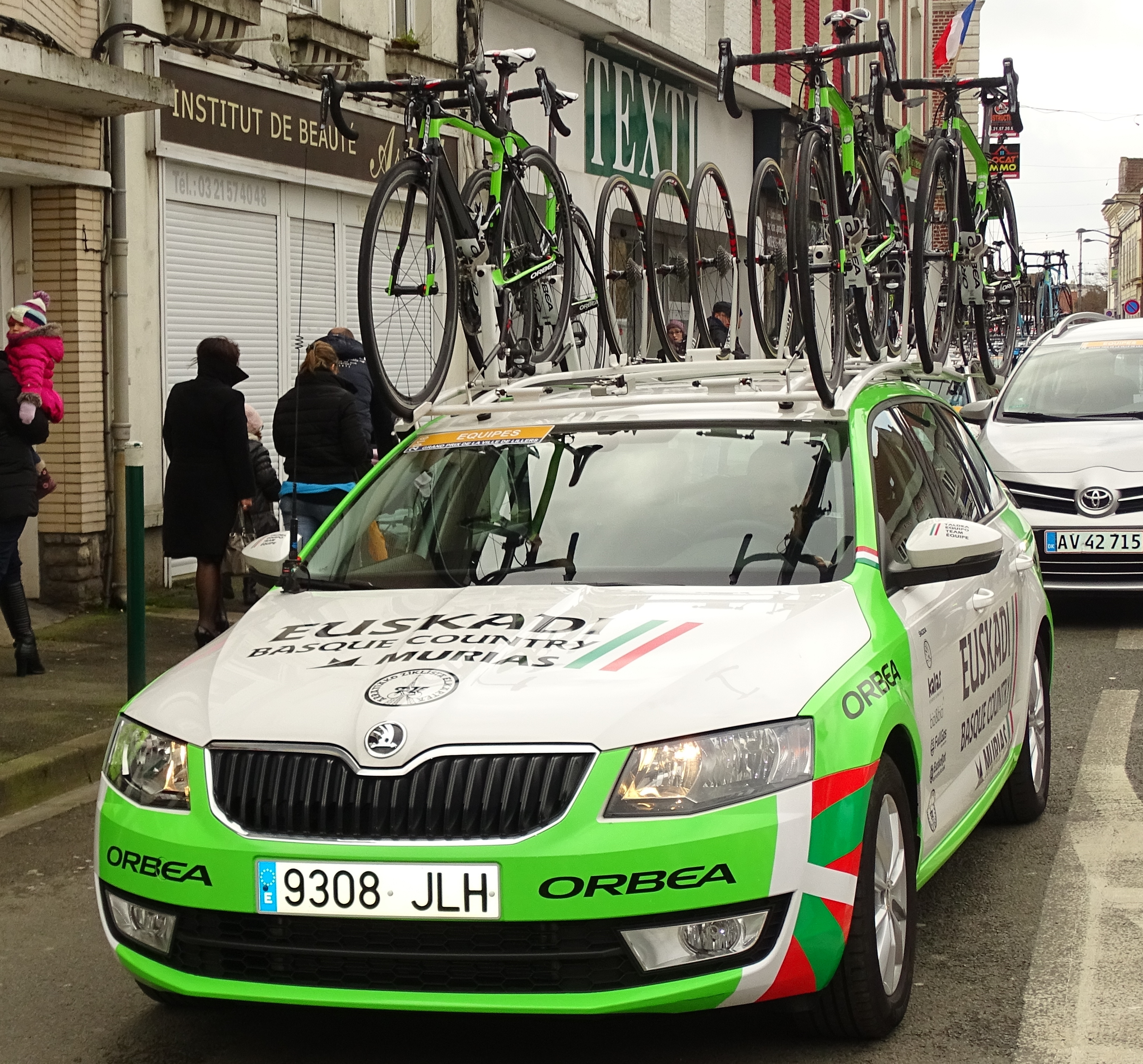 Reportage réalisé le dimanche 6 mars à l'occasion du départ et de l'arrivée du Grand Prix de Lillers-Souvenir Bruno Comini 2016 à Lillers, Pas-de-Calais, Nord-Pas-de-Calais, France.